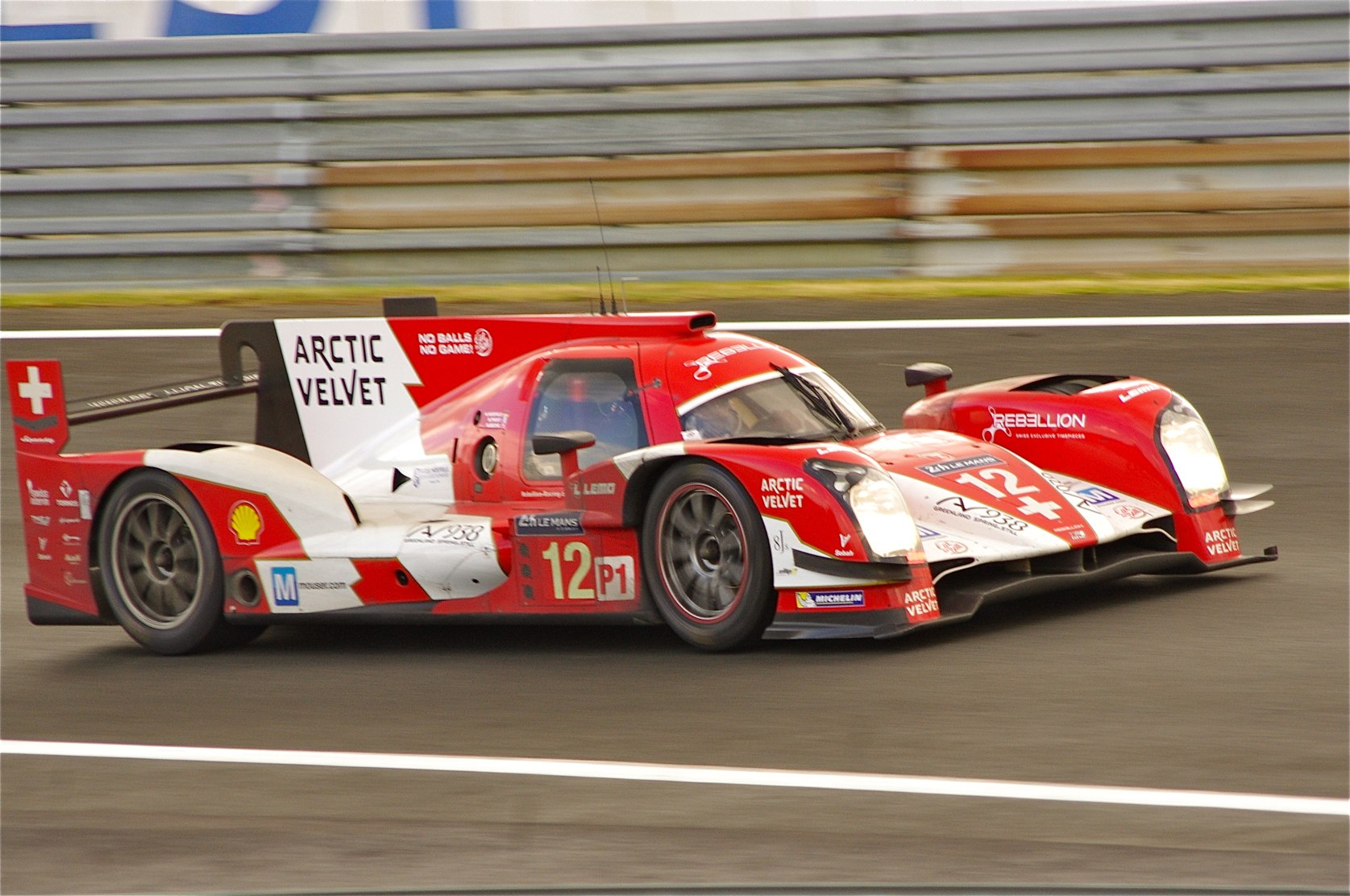 Rebellion R-One n°12 lors des 24 Heures du Mans 2014.